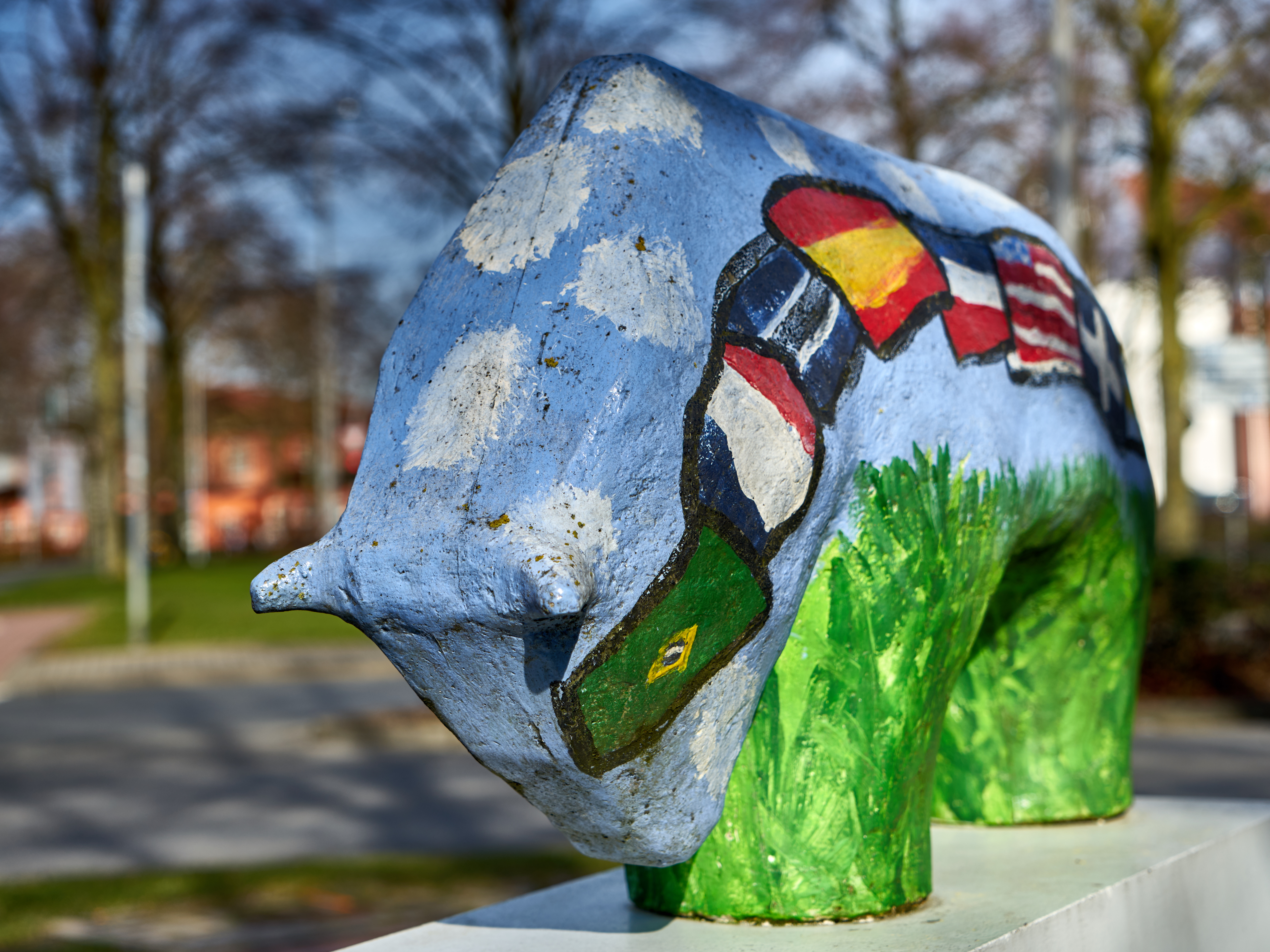 „Auf Ochse!“ ist ein Kunstprojekt des in Coesfeld ansässigen Kunstervereins Münsterland e.V.. Der Ochse ist das Wappentier der Kreisstadt Coesfeld, nach Münster älteste Stadt im Münsterland. An historisch bedeutenden und besonders ausgezeichneten Stellen der Stadt Coesfeld wurden insgesamt 13 in Beton gegossene und bemalte Ochsen auf Sockeln platziert.Der abgebildete Ochse Globe Trotter steht am Standort des früheren, 1320 erbauten Viehtores. Von hier, wo Kleine und Große Viehstraße aufeinander treffen, führten die Straßen nach Ahaus und Rheine.